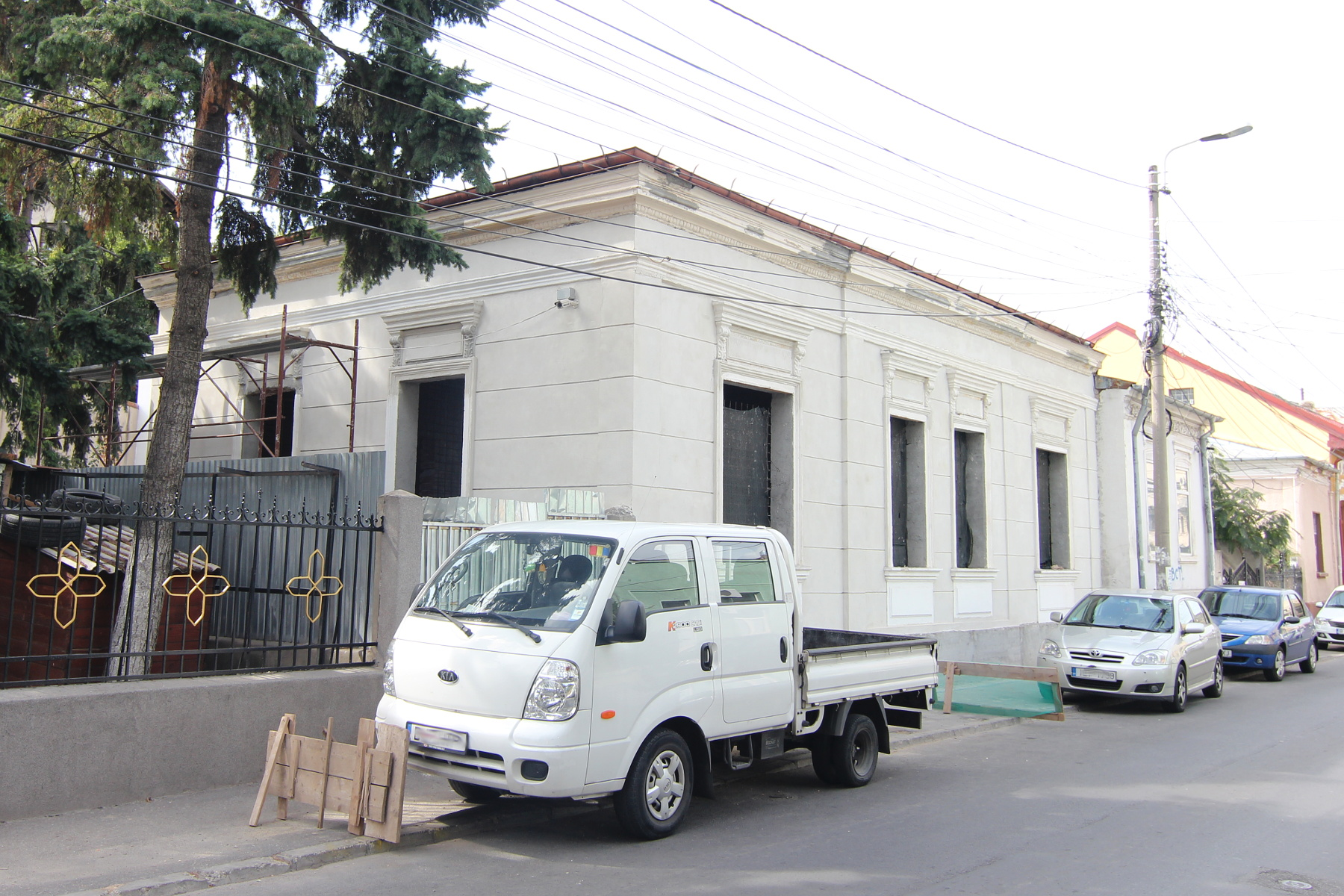 Casă pe Str Robescu